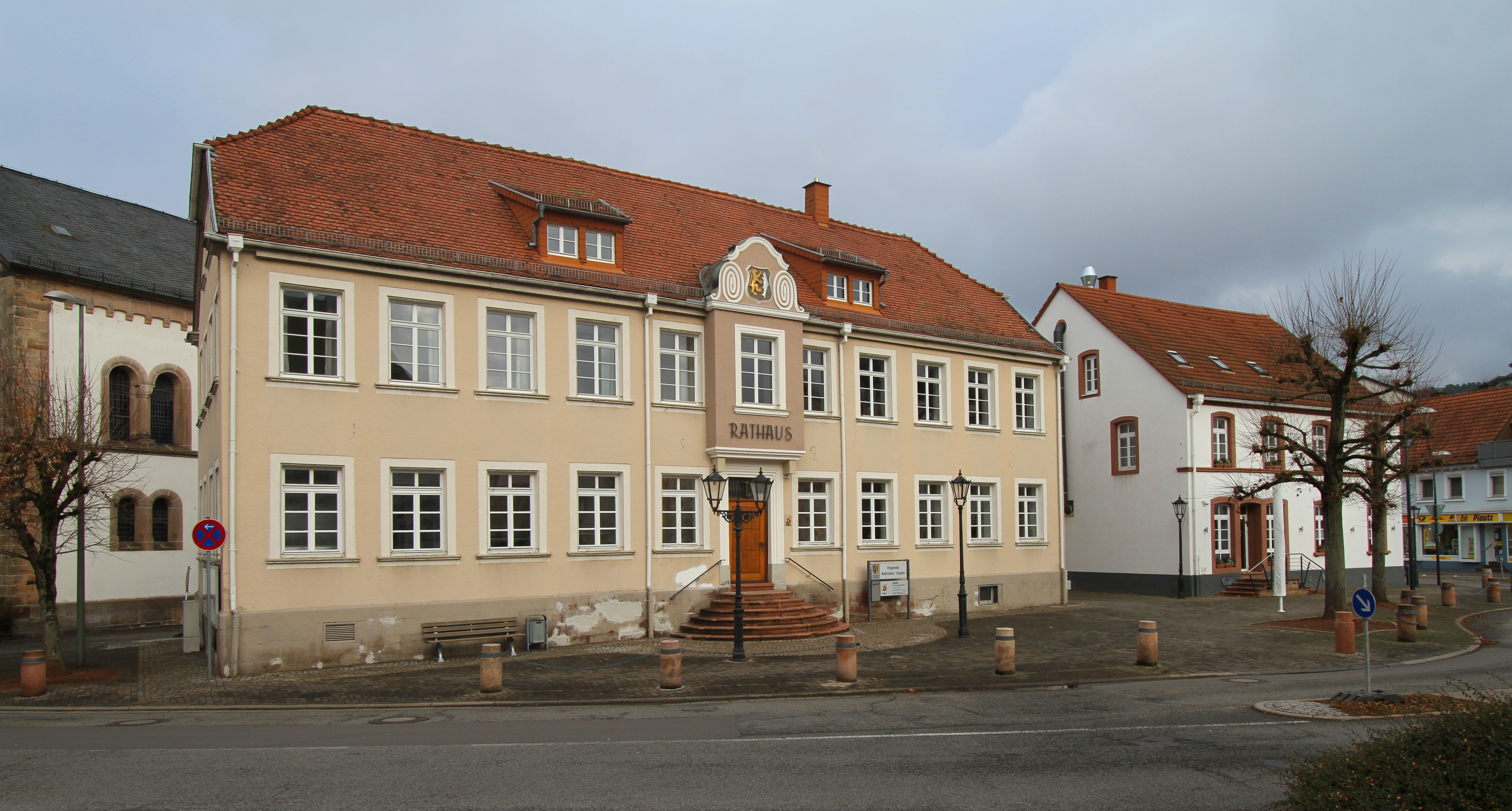 Waldfischbach